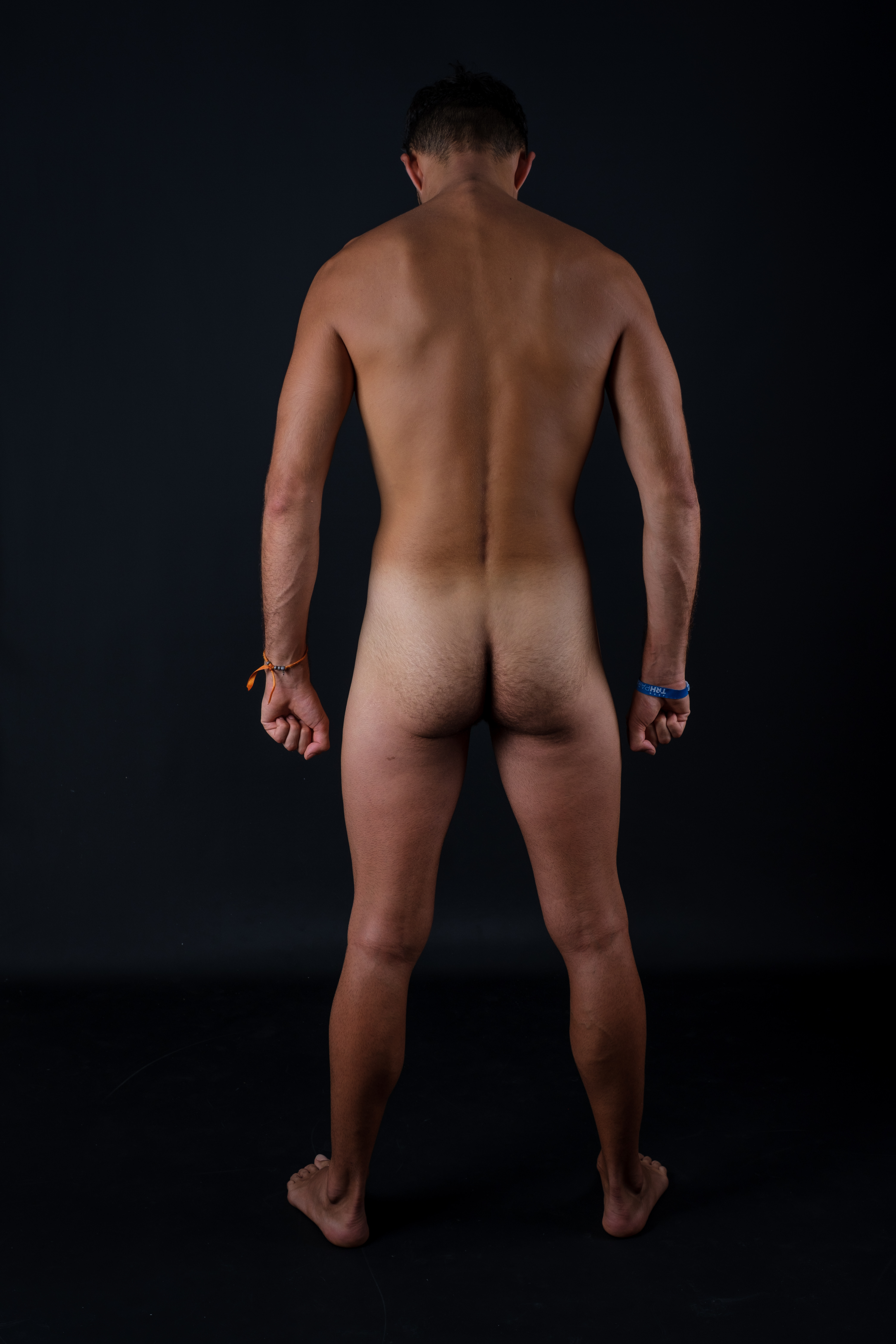 Representa a la espalda de un hombre de 23 años con las nalgas